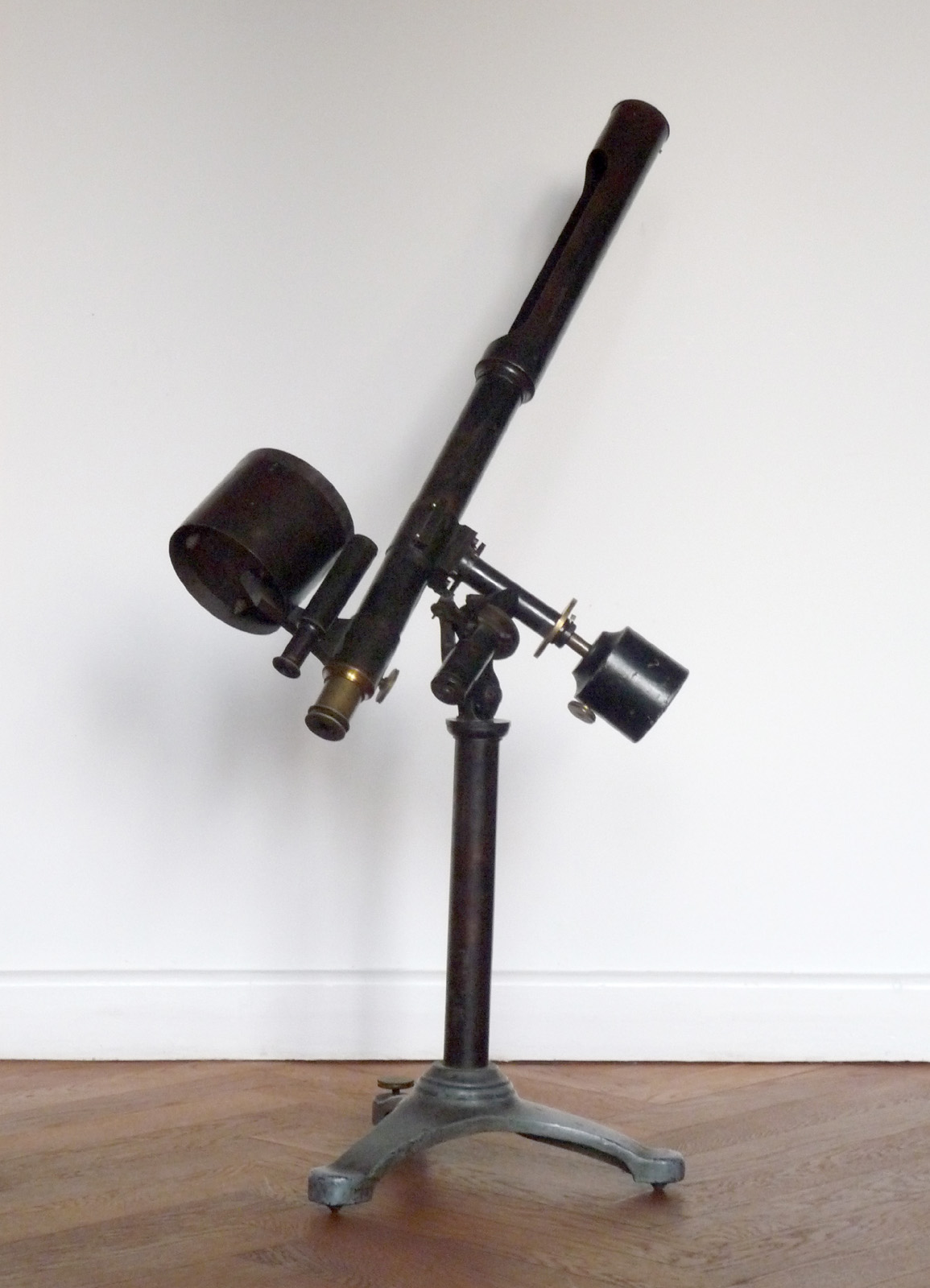 Foto eines original Fritsch Schiefspieglers mit 108 mm Hauptspiegel